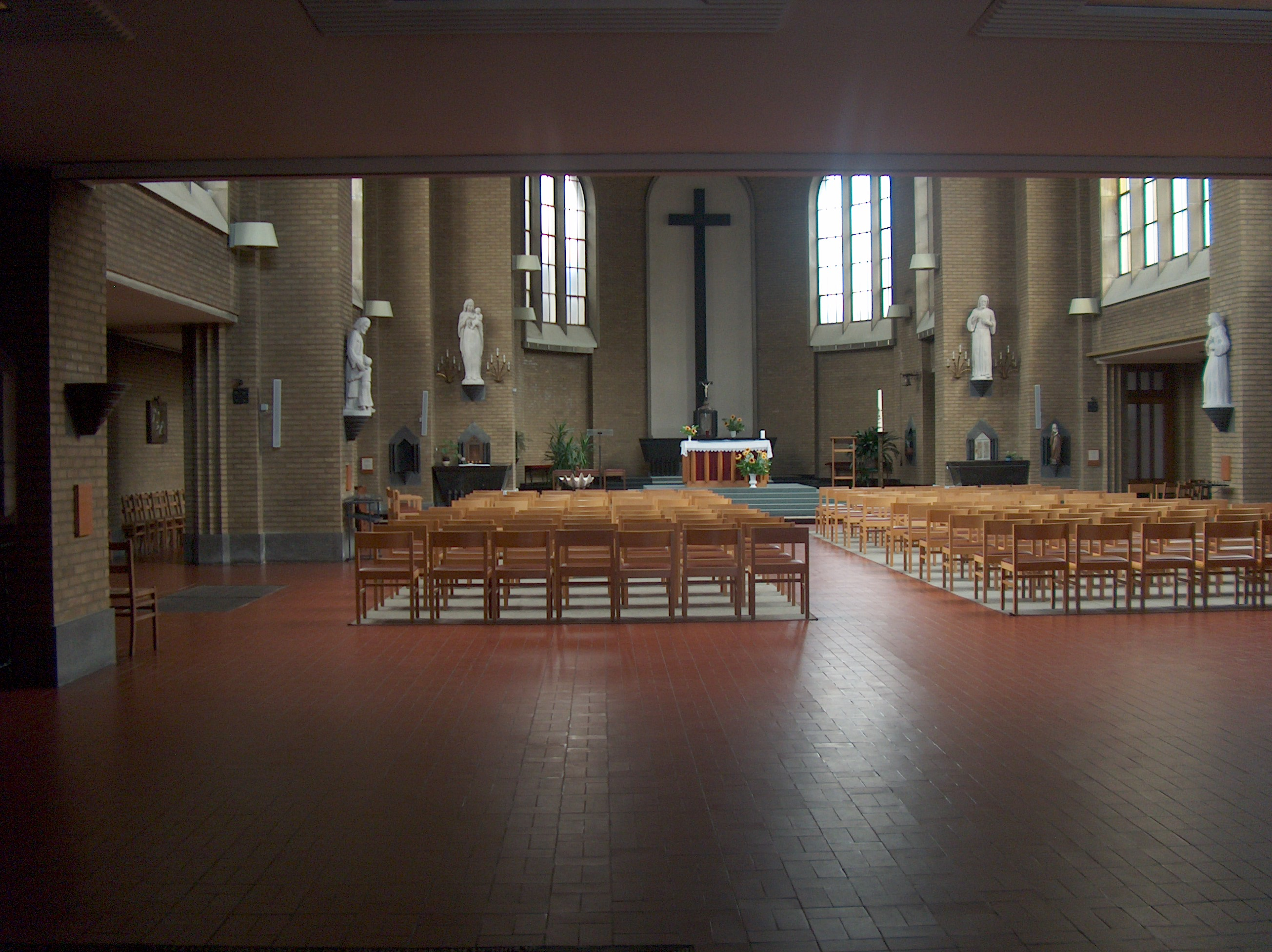 L'église Sainte-Alice, avenue Dailly à Schaerbeek, Bruxelles, Belgique.